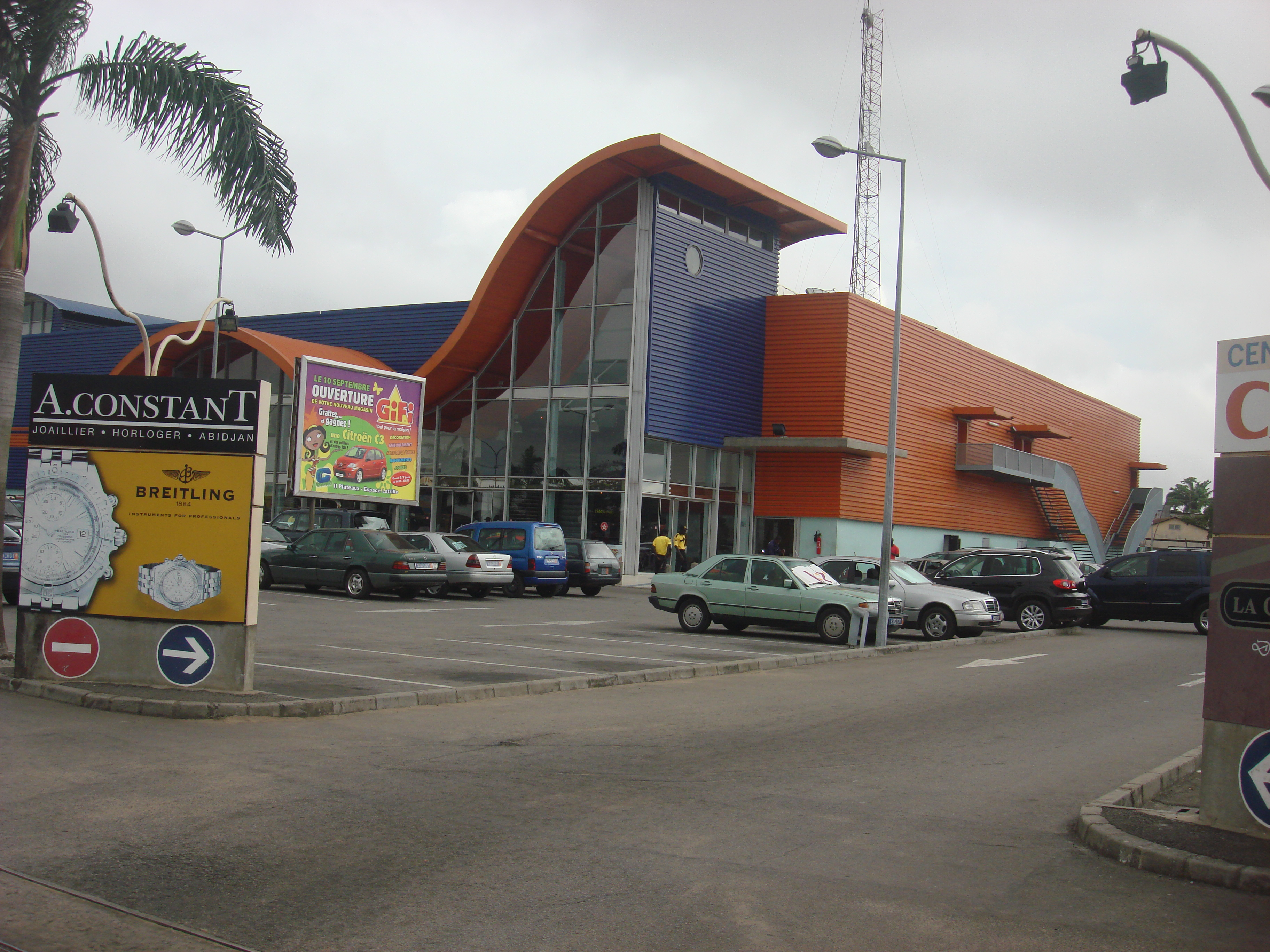 Le centre commercial Cap Sud, adjacent au boulevard Valéry Giscard d'Estaing, dans la commune de Marcory à Abidjan.